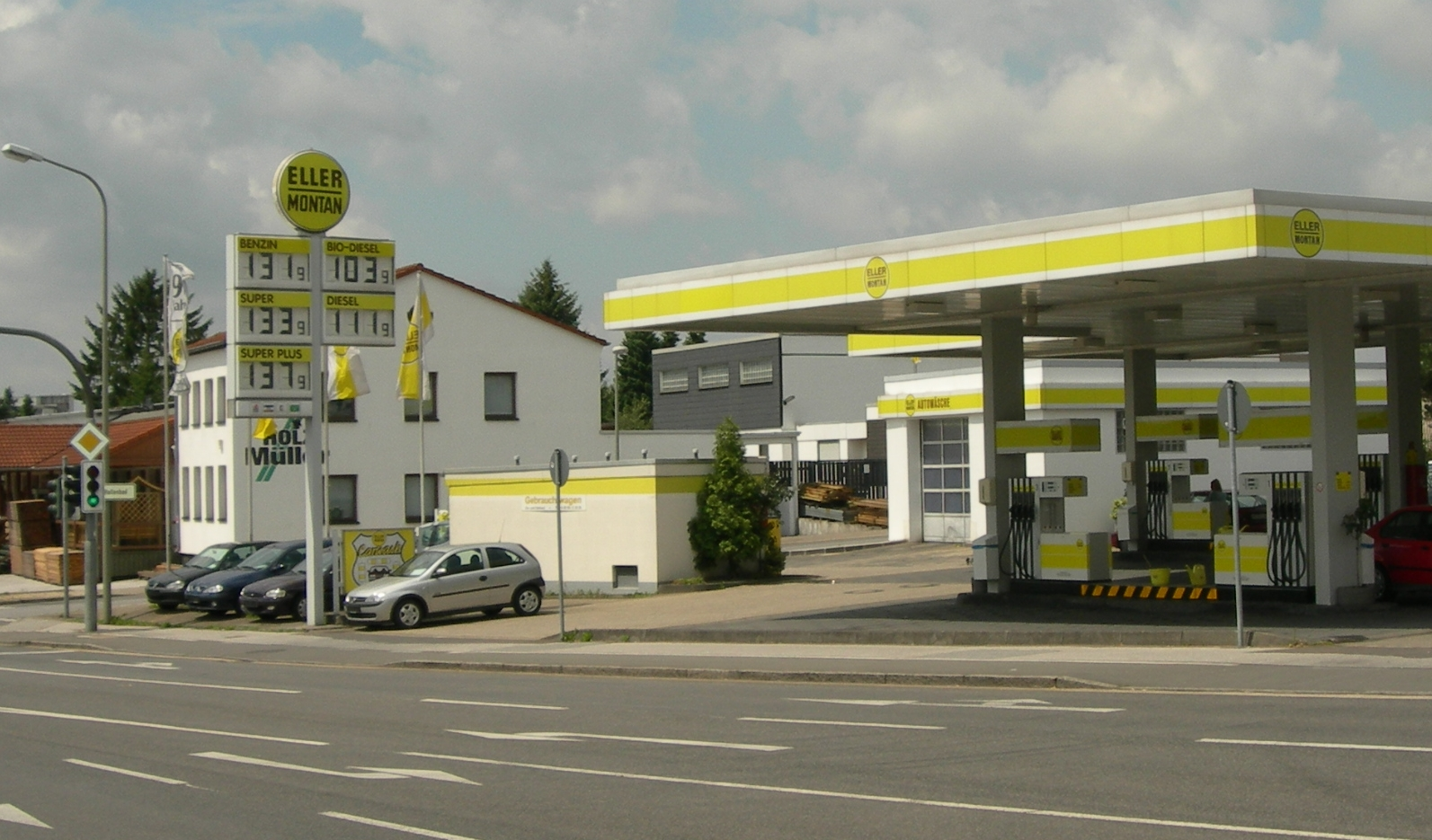 freie Tankstelle Eller-Montan, Heiligenhaus, Kreis Mettmann